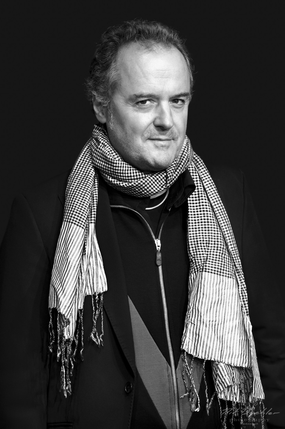 Stefan Haupt (* 1961 in Zürich) ist ein Schweizer Filmemacher, Regisseur, Autor und Filmproduzent.